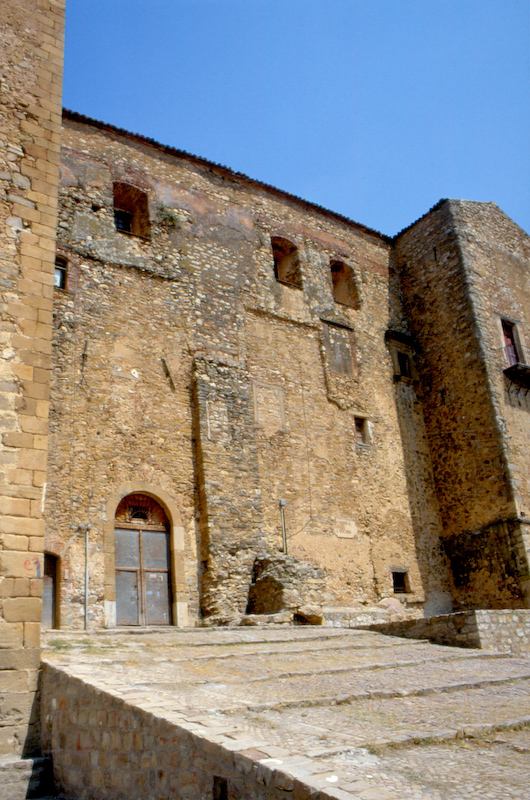 Castello dei Ventimiglia, Castelbuono, Palermo, Sicily